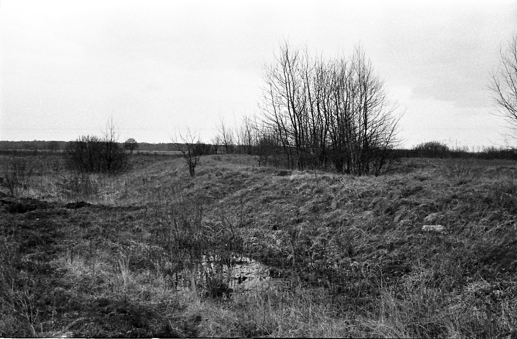 Zewnętrzne wały grodziska w roku 1993 (przed zniszczeniem).